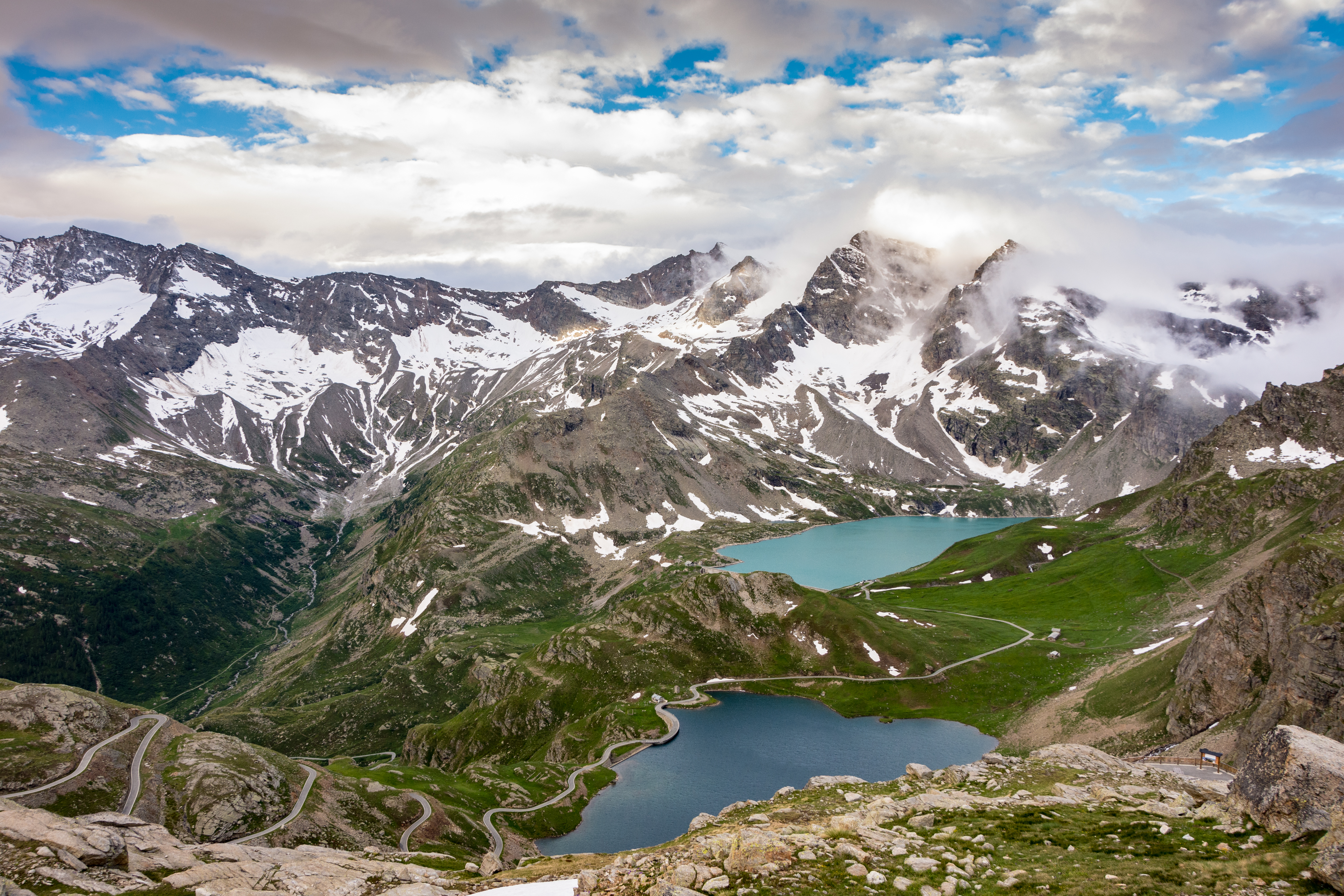 Parco nazionale del Gran Paradiso (Q847690)